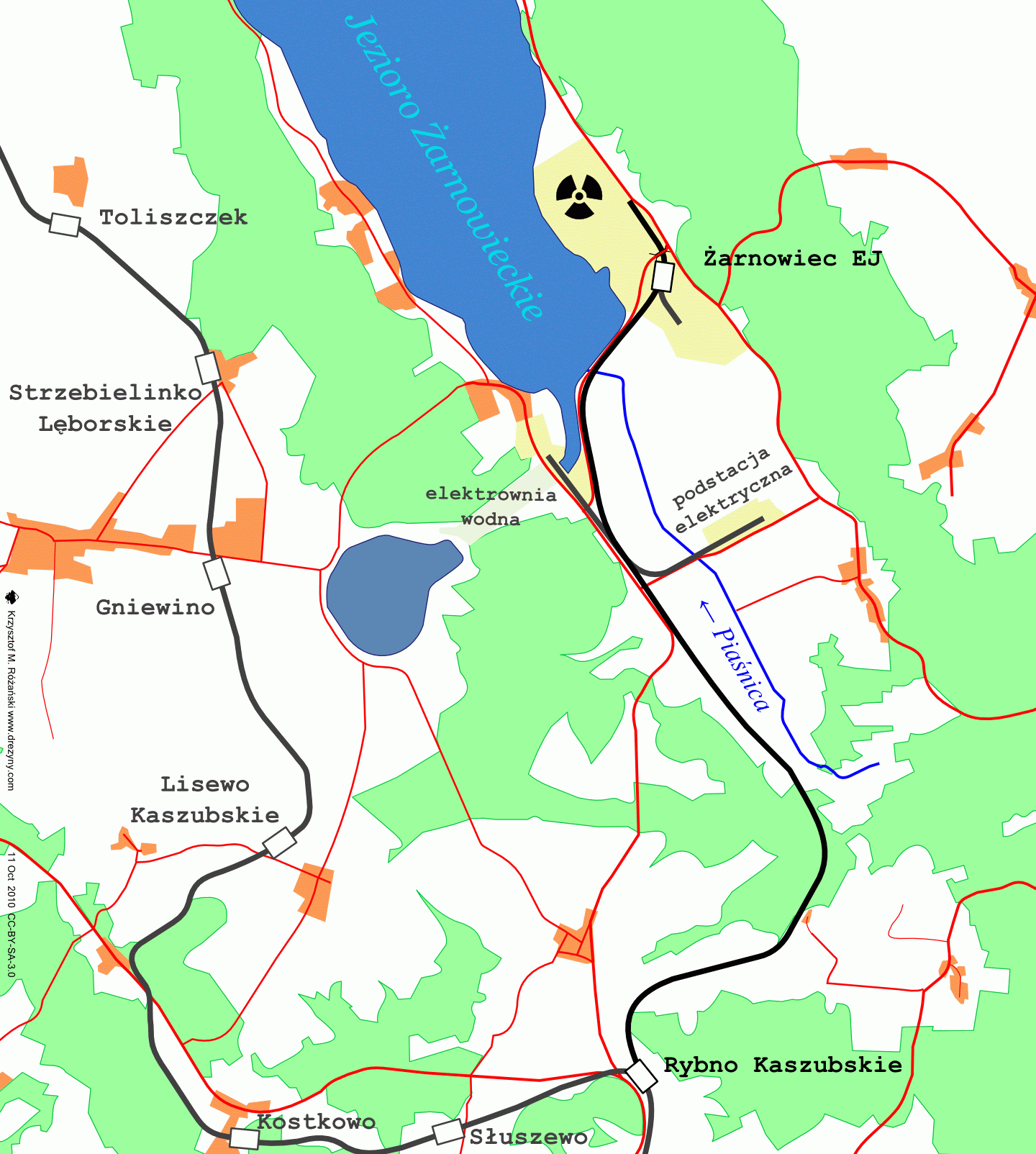 schemat historyczny linii kolejowej nr 230A Rybno Kaszubskie - Zarnowiec Elektrownia Jadrowa